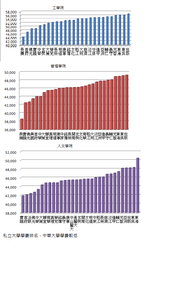 中華大學學費較低